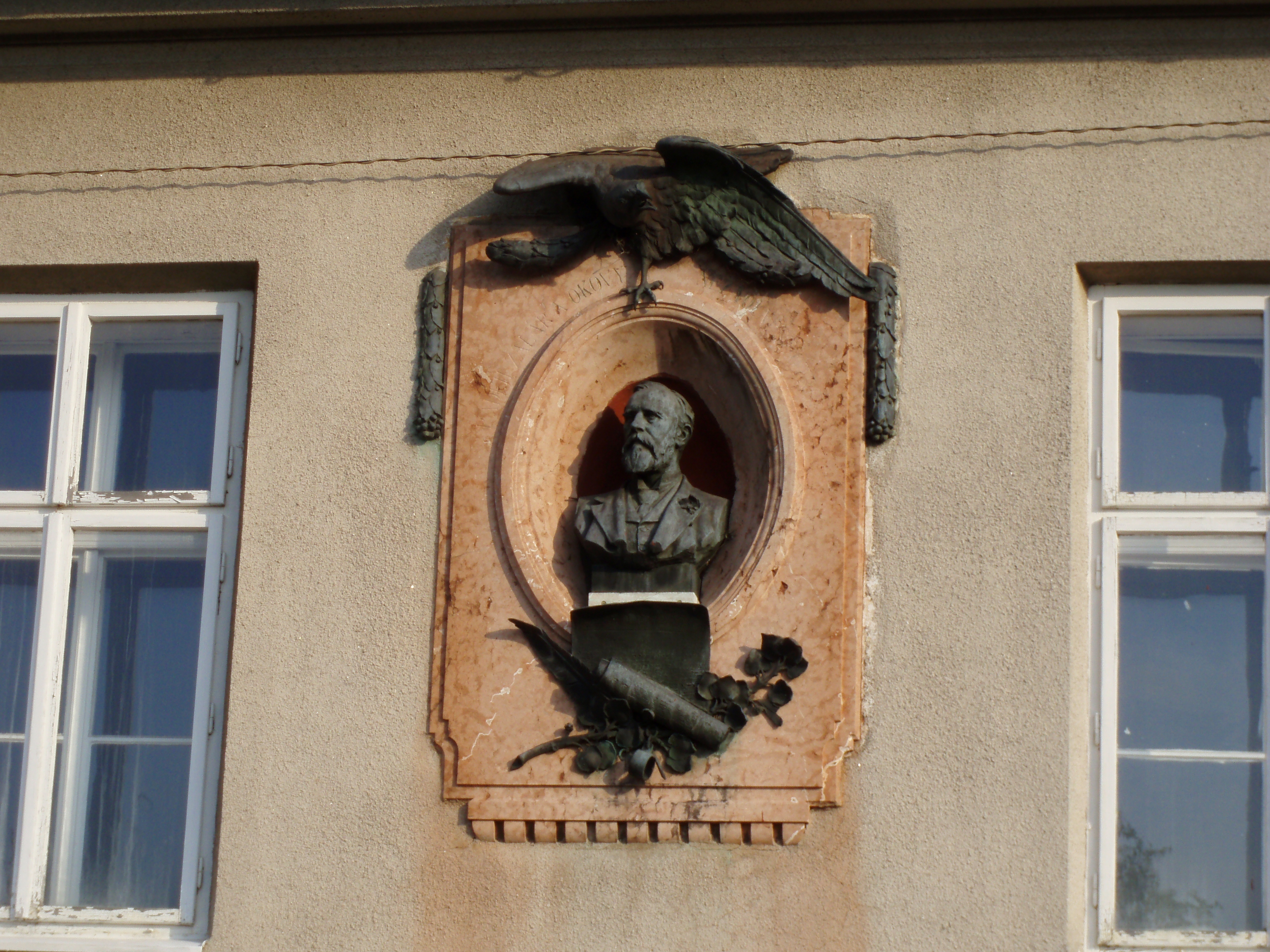 Pamětní deska J. Grégrovi